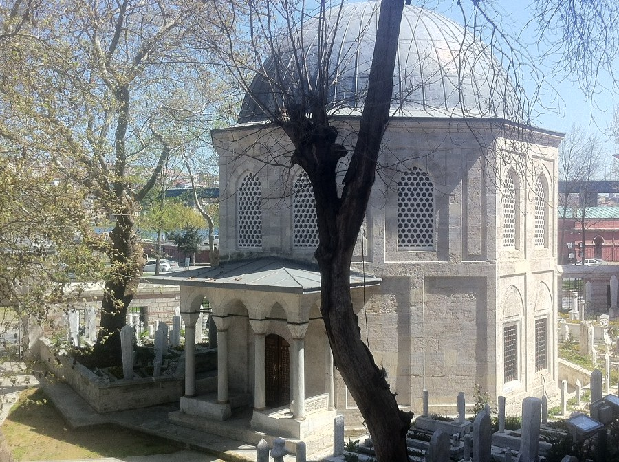 Zal Mahmut Paşa Türbesi-Eyüp